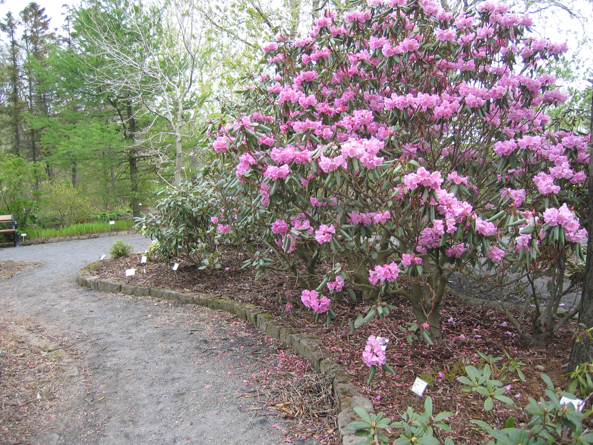 photo taken by Salvör in Grasagarður Reykjavíkur Botanical garden in Reykjavik, Iceland.